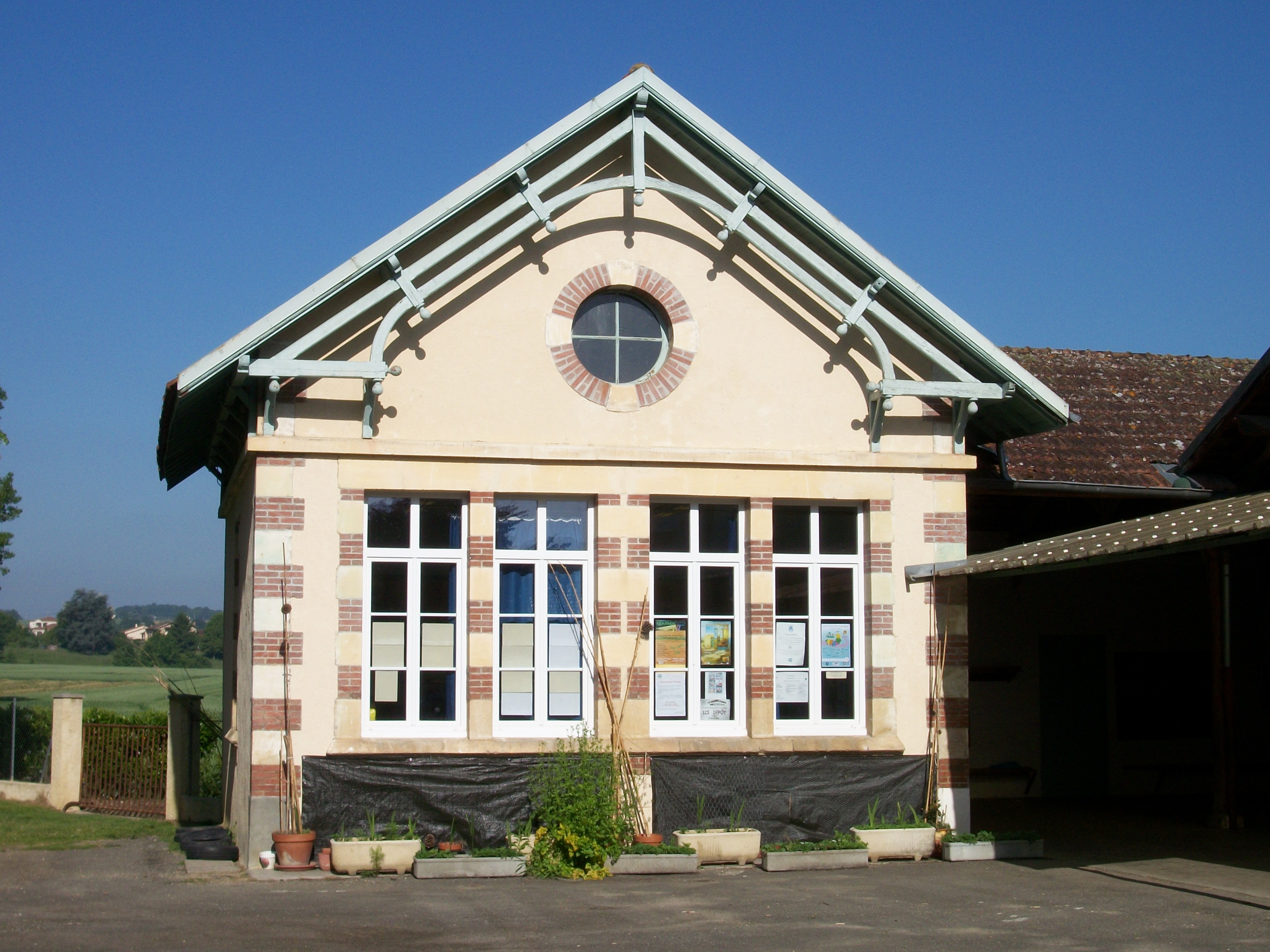 École de Berdoues (Gers, France)